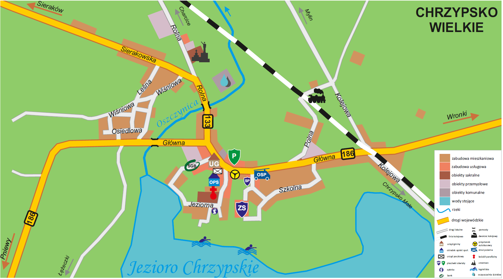 Mapa wsi Chrzypsko Wielkie